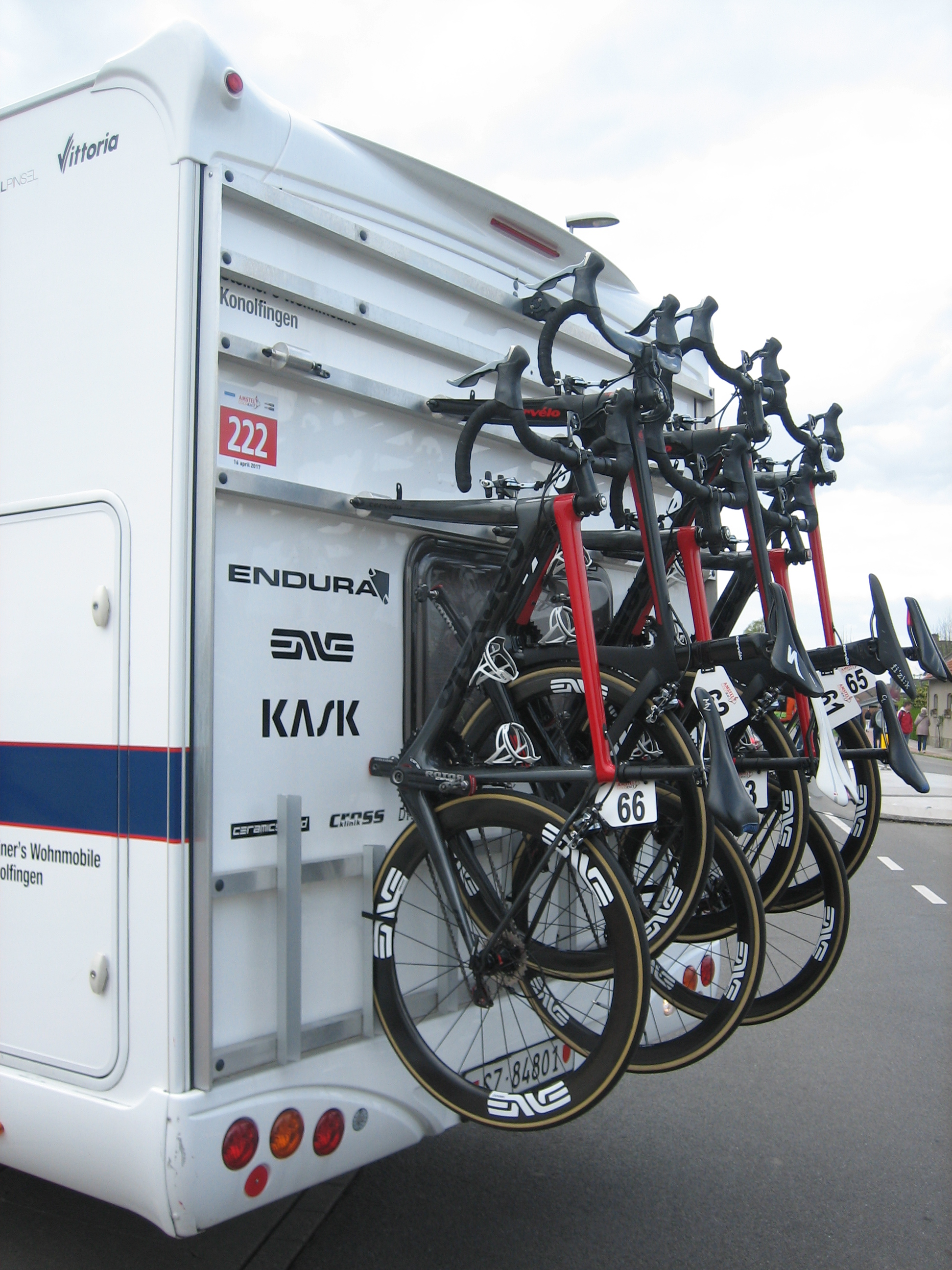 Na de finish van de Amstel Gold Race Ladies Edition 2017.